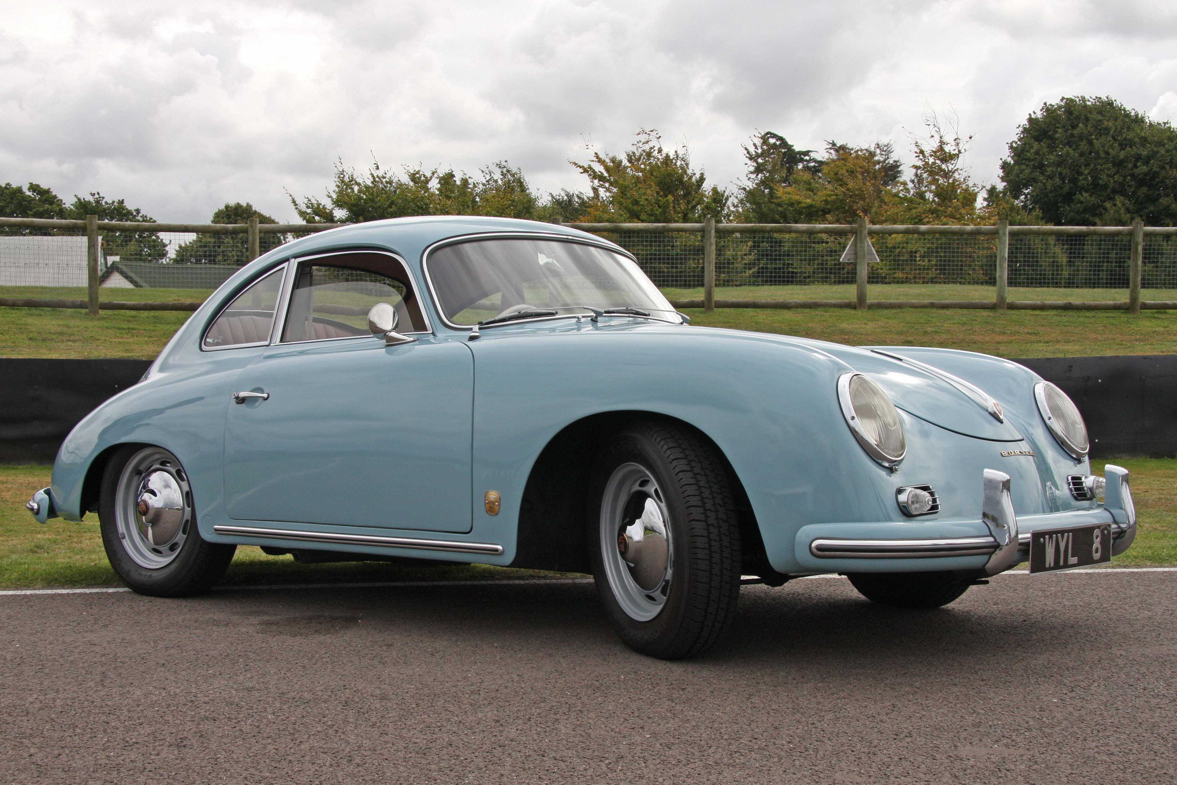 Porsche